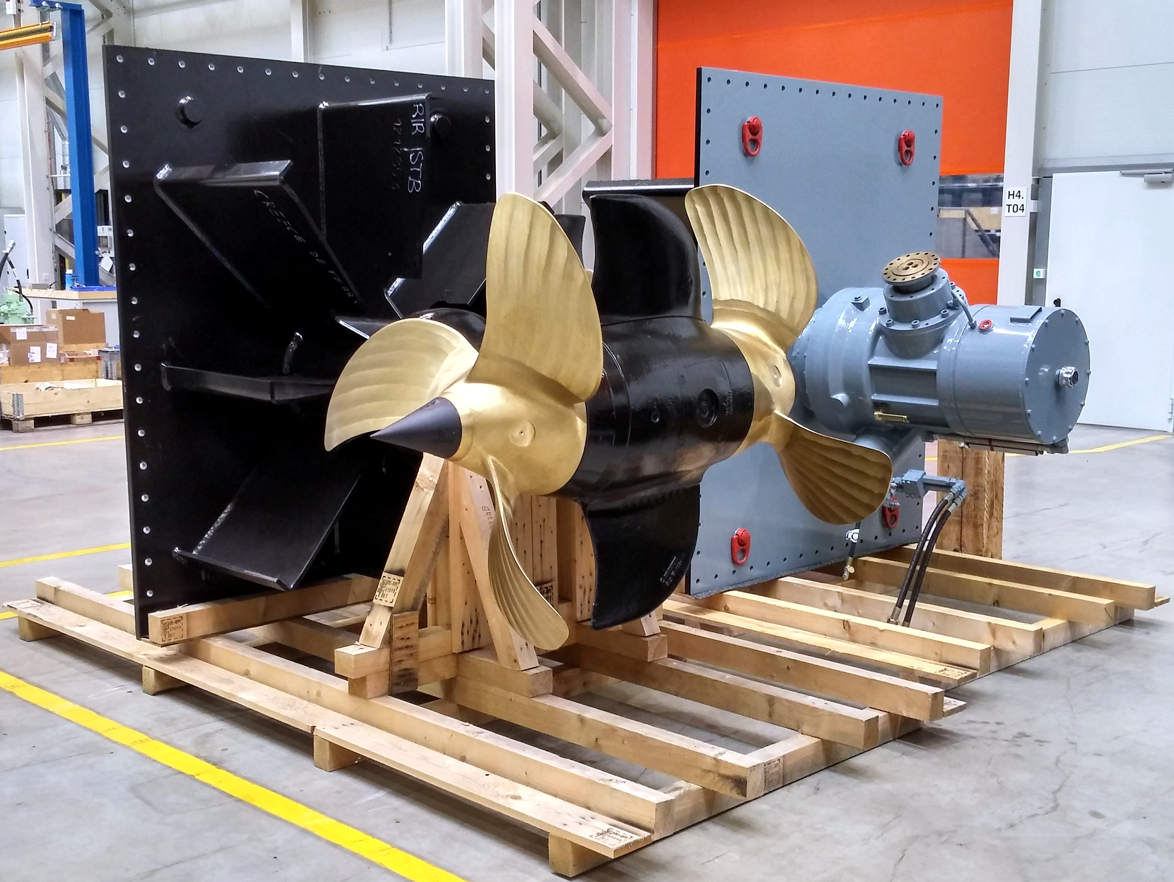 Schottel Twin-Propeller (STP) in der Fertigungshalle (Dörth)